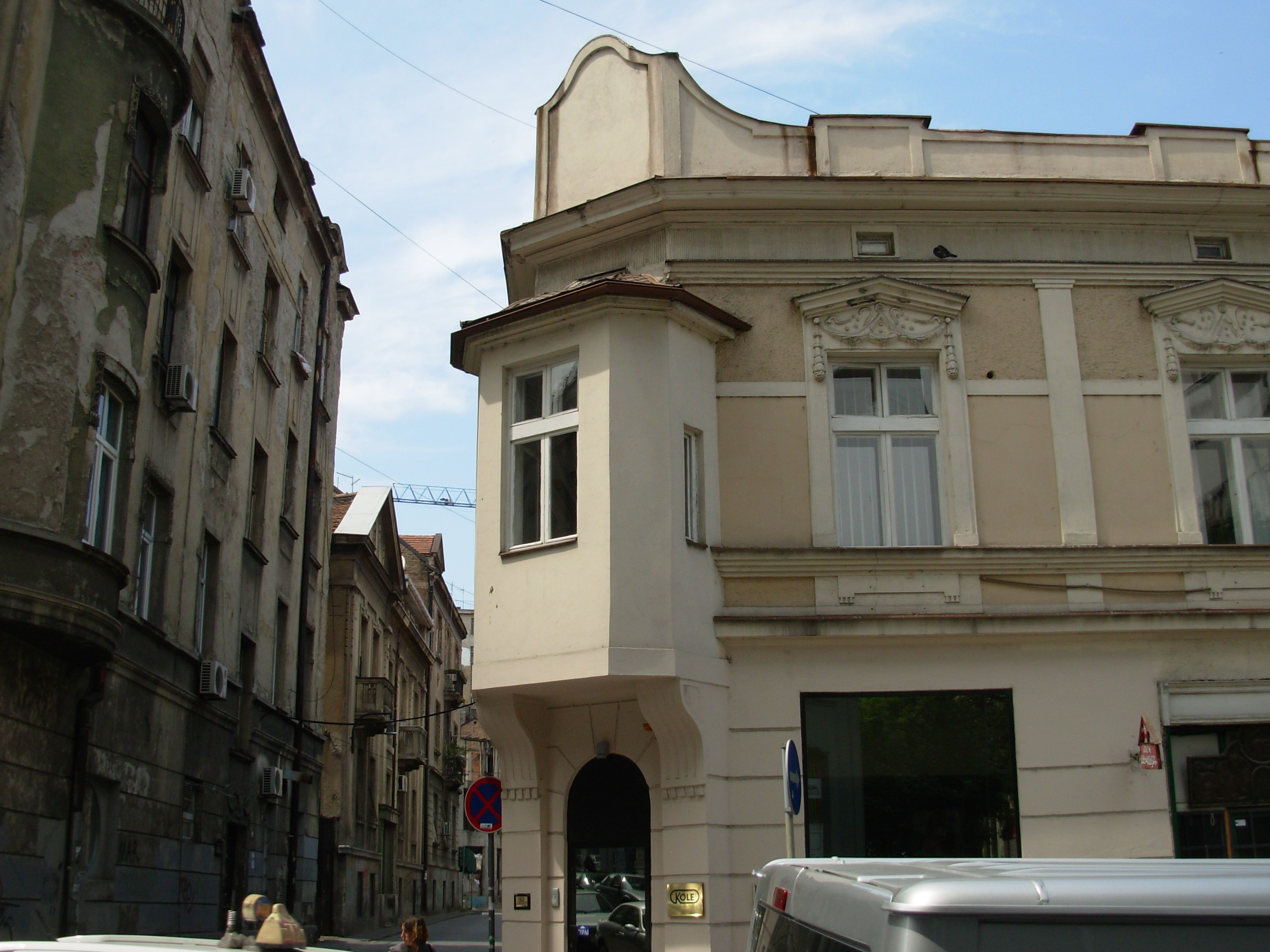 Kibic fenster u ulici Kralja Petra I u Beogradu, slikao Goldfinger